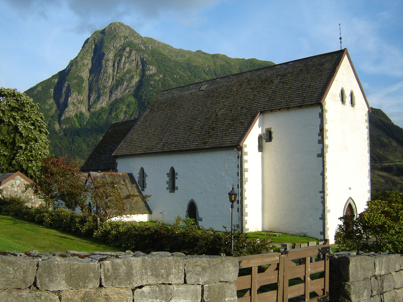 Kvinnherad kirke - stone church, Rosendal, Norway